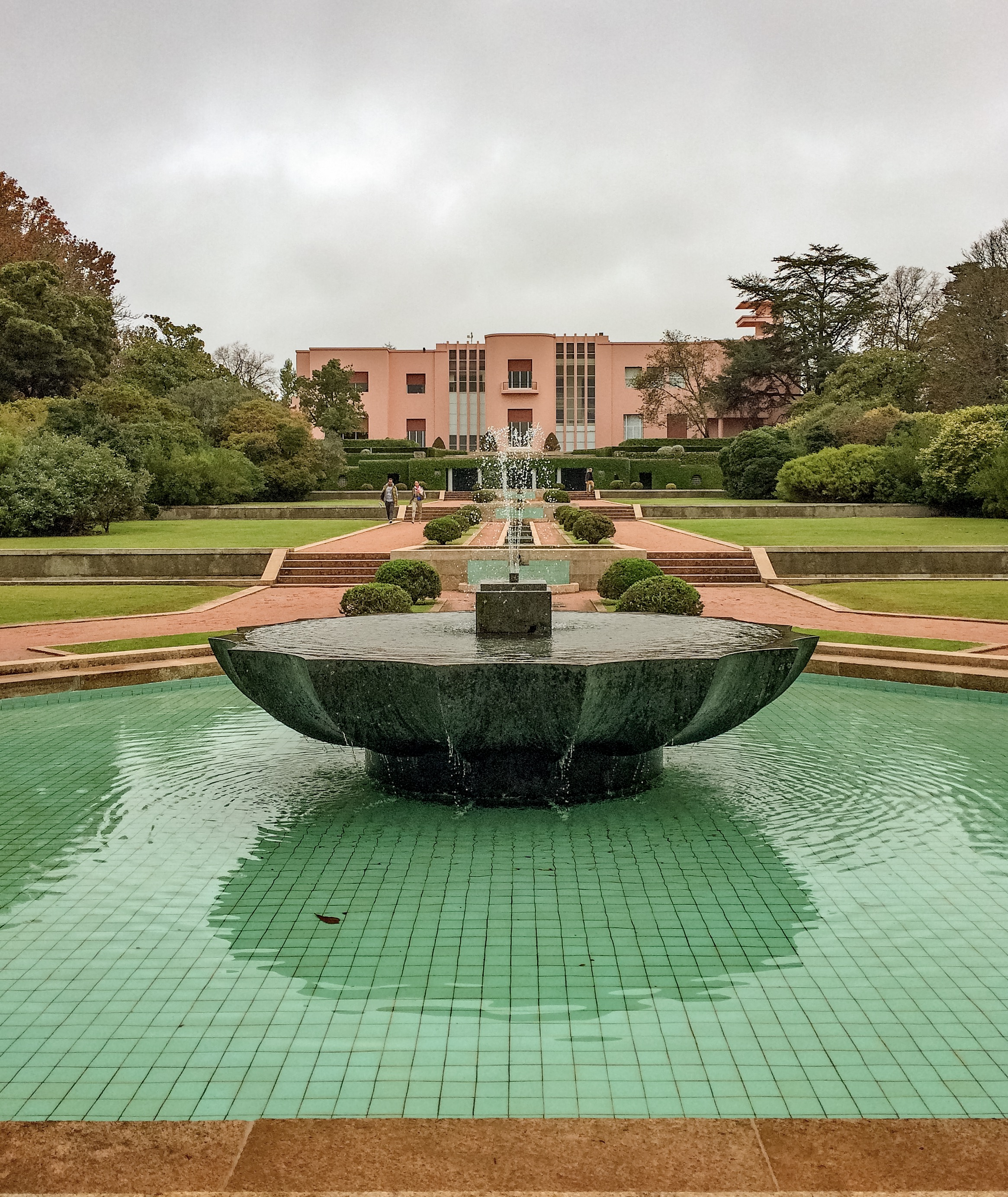 Parque de Serralves, view to Casa Serralves, Oct. 2015